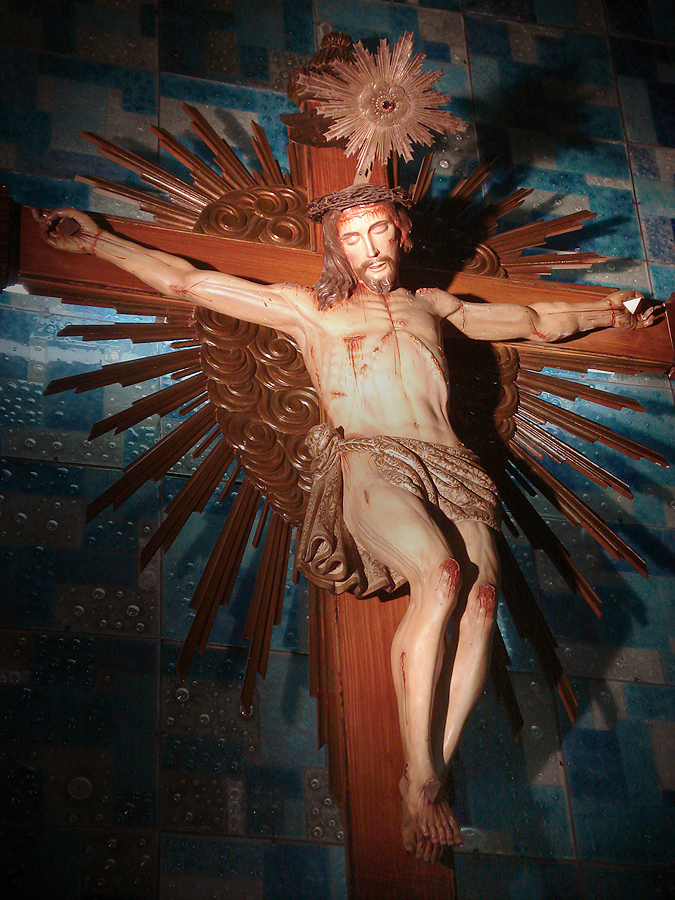 Interior da Capela Nosso Senhor Jesus do Bom Fim, Porto Alegre, Brasil. Crucifixo proveniente das Missões Jesuíticas do Paraguai